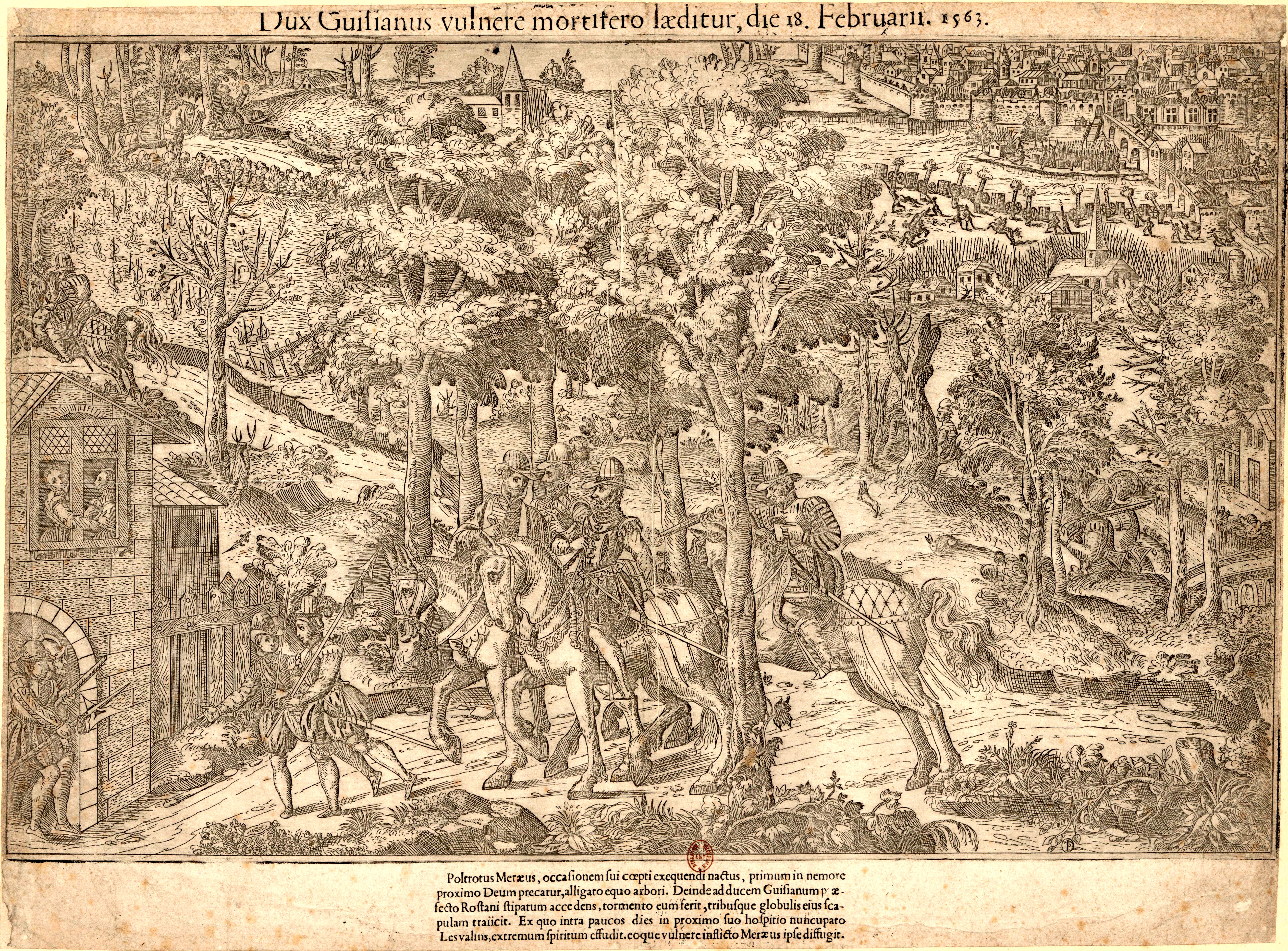 Assassinat du duc François de Guise, 18 février 1563. Gravure réalisée par Tortorel et Perrissin, vers 1570. B = Duc de Guise. E = Jean de Poltrot de Méré.